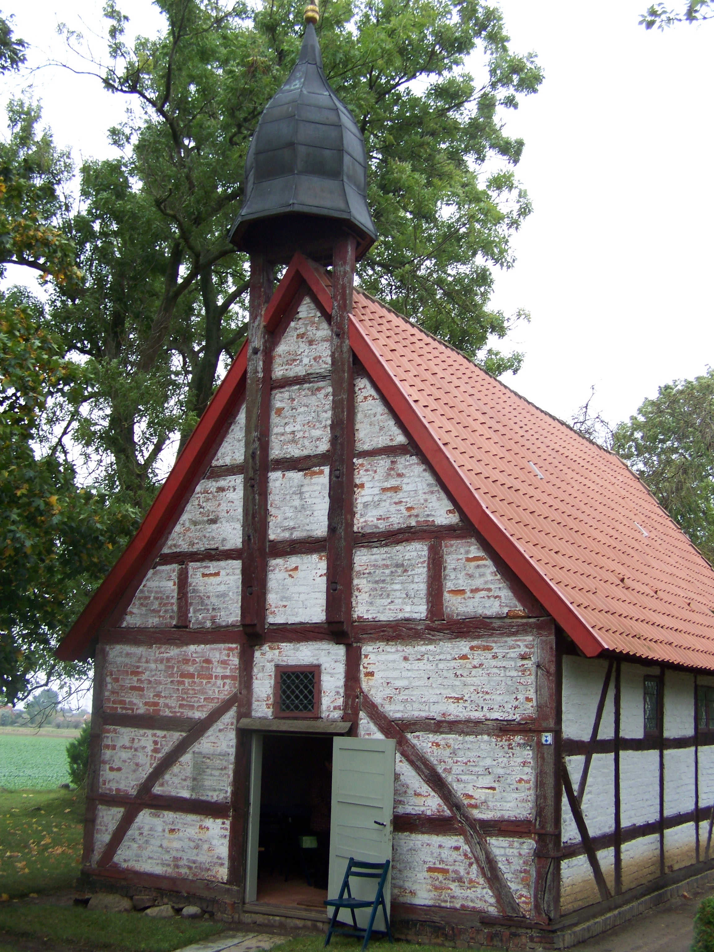 Kapelle in Jarmshagen (Gemeinde Wackerow, Landkreis Ostvorpommern)